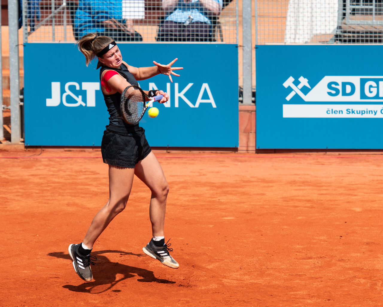 Karolína Muchová